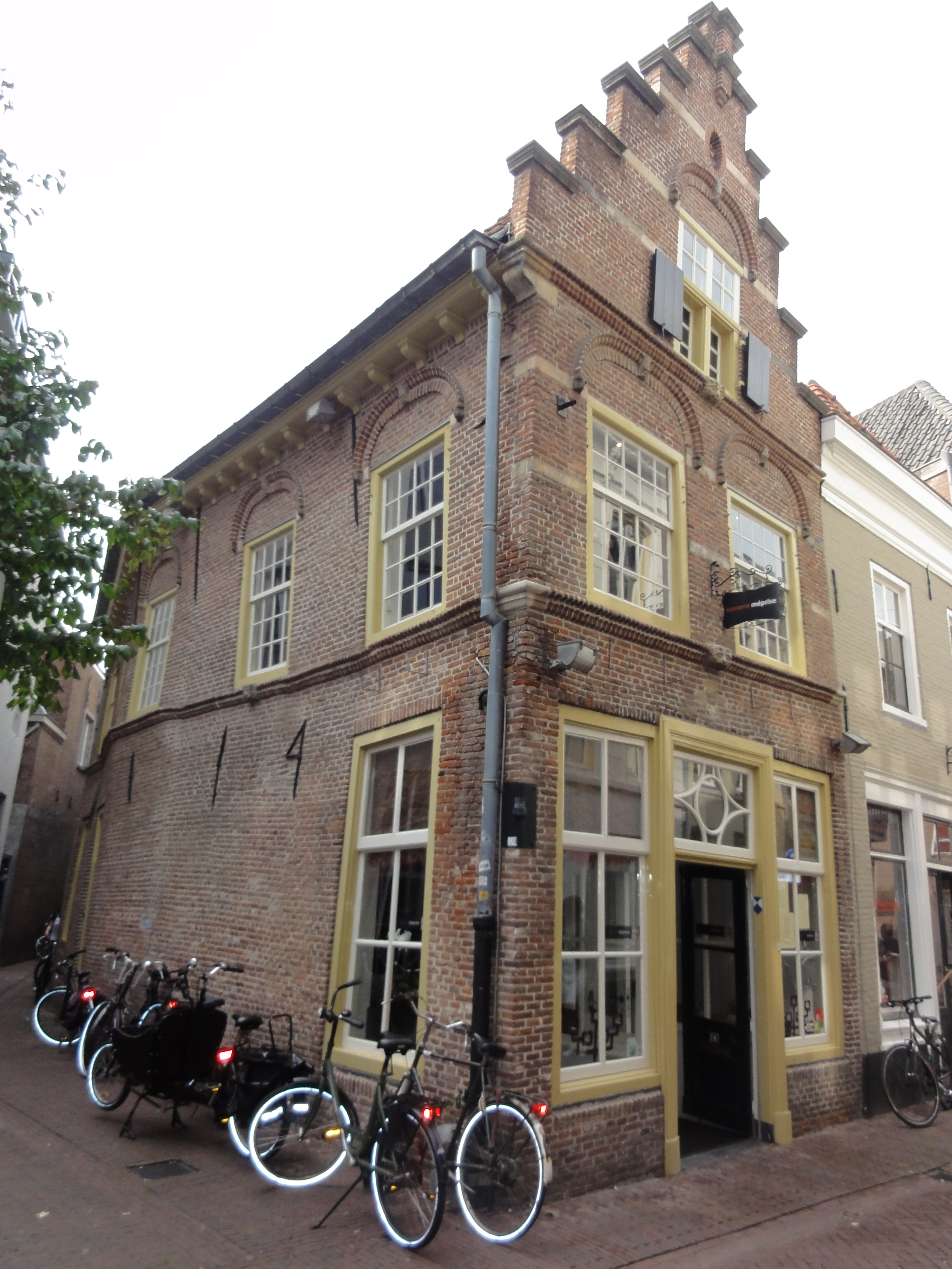 's-Hertogenbosch Rijksmonument 21848 Snellestraat 28 34″ N, 5° 18′ 04.91″ E Object location51° 41′ 18.37″ N, 5° 18′ 04.89″ E